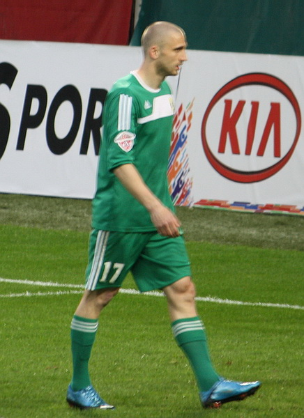 Jan Holenda